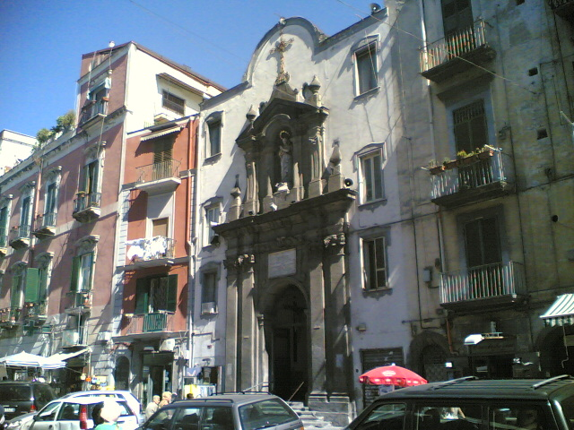 Faccita, Maria dei Vergini, Napoli